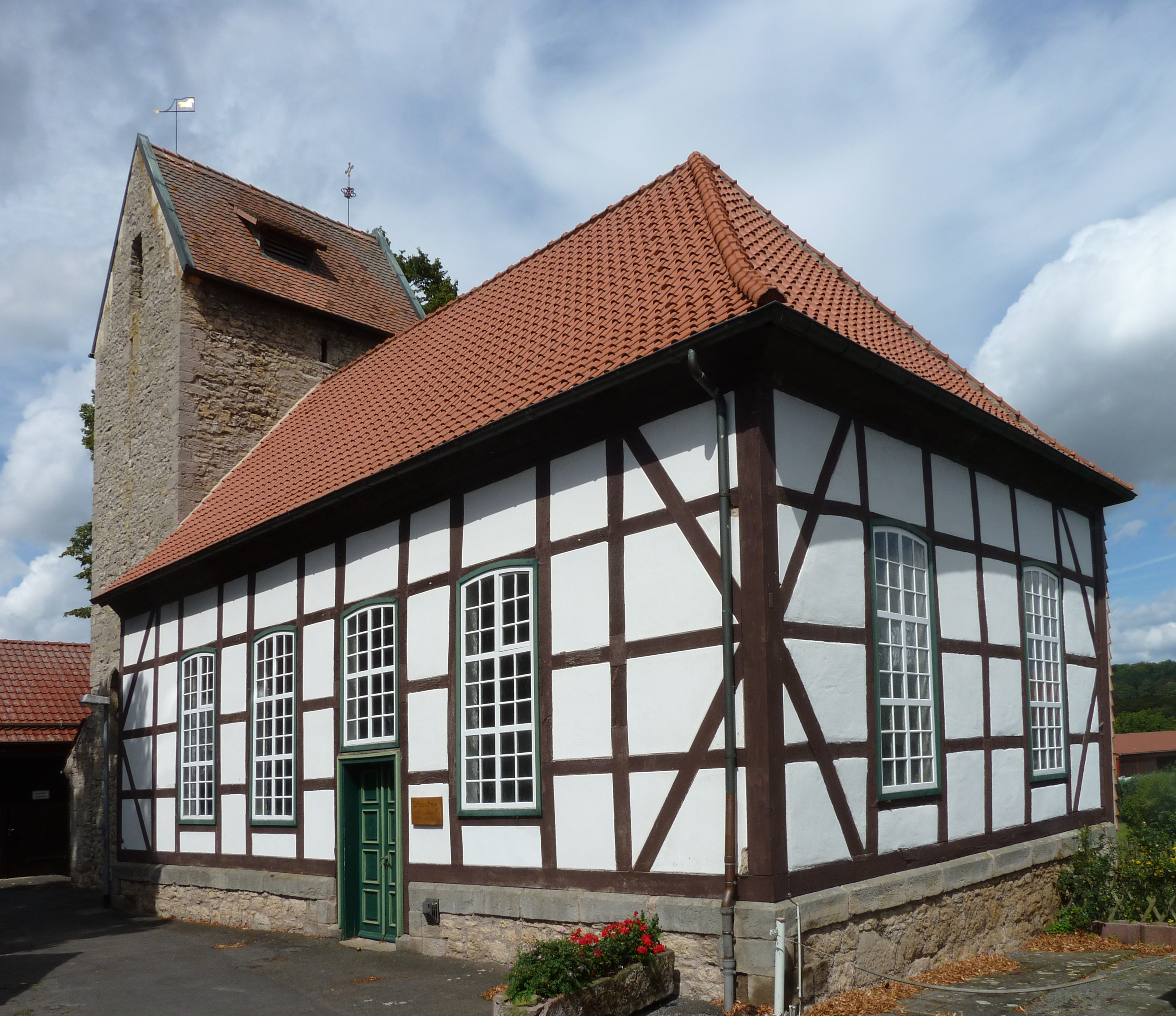 Ev.-luth. Kapelle St. Crucis in Ossenfeld, Stadt Dransfeld, Niedersachsen. Mittelalterlicher Wehrturm in Muschelkalk-Bruchsteinmauerwerk, Kirchenschiff 1774–76 durch Fachwerksaal ersetzt. Veränderungen 1831 und 1844, renoviert 1992